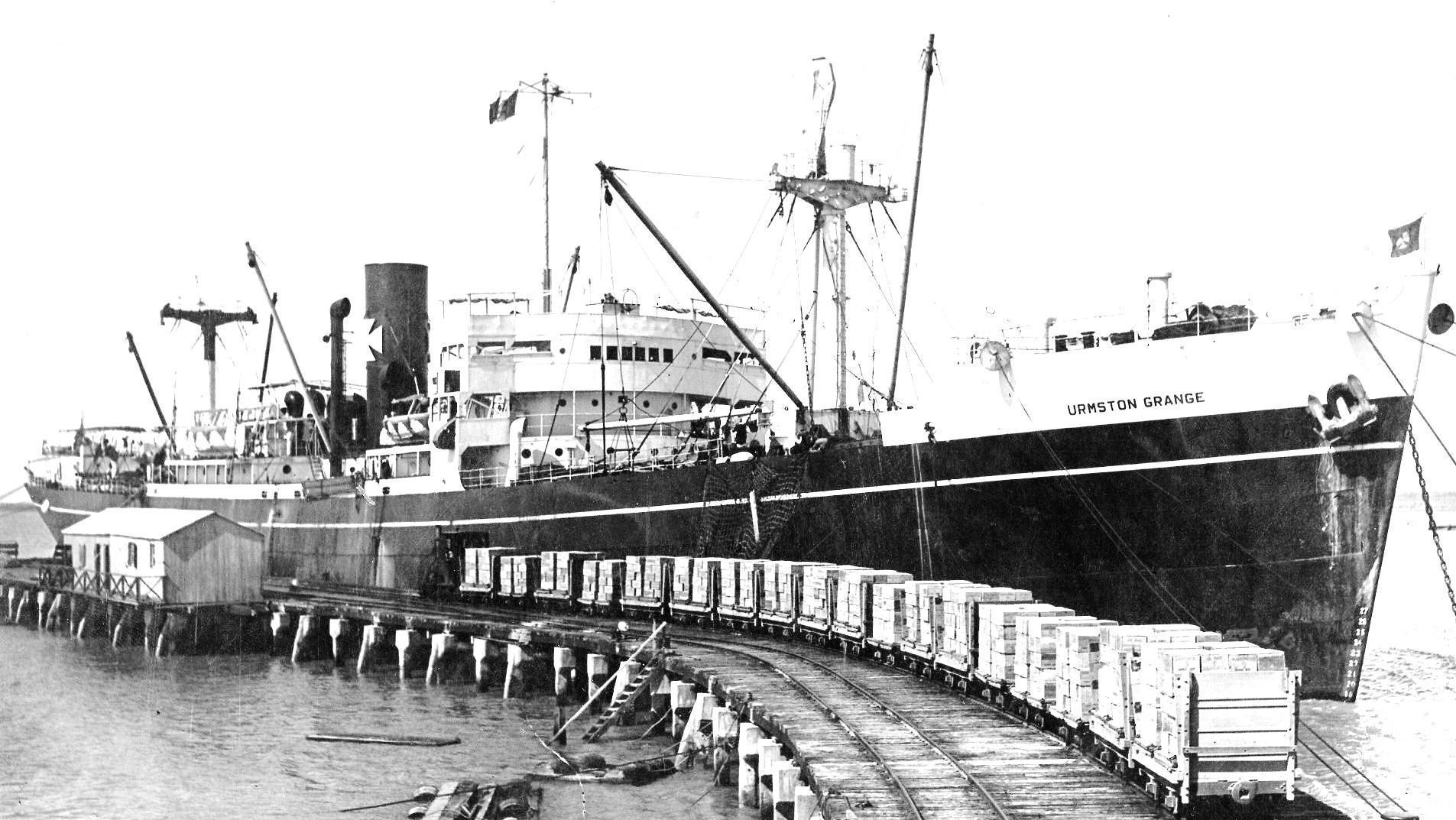 Cargamento de productos La Negra en el barco Urmston Grange